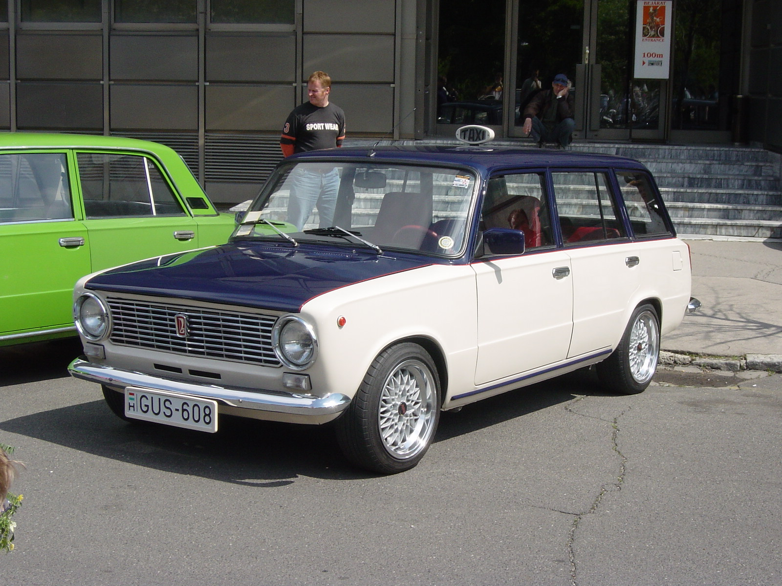 Lada 2102-based taxi during the Szocialista Jáműipar Gyöngyszemei 2008.